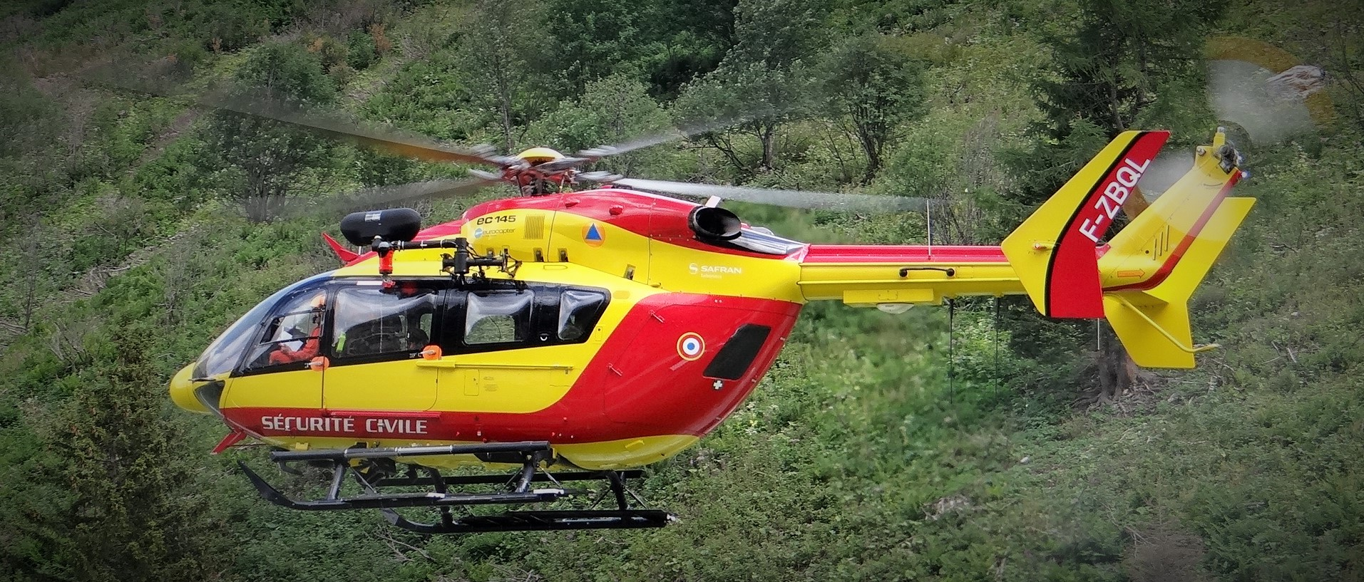 Intervention au hameau des Prioux, Pralognan-la-Vanoise